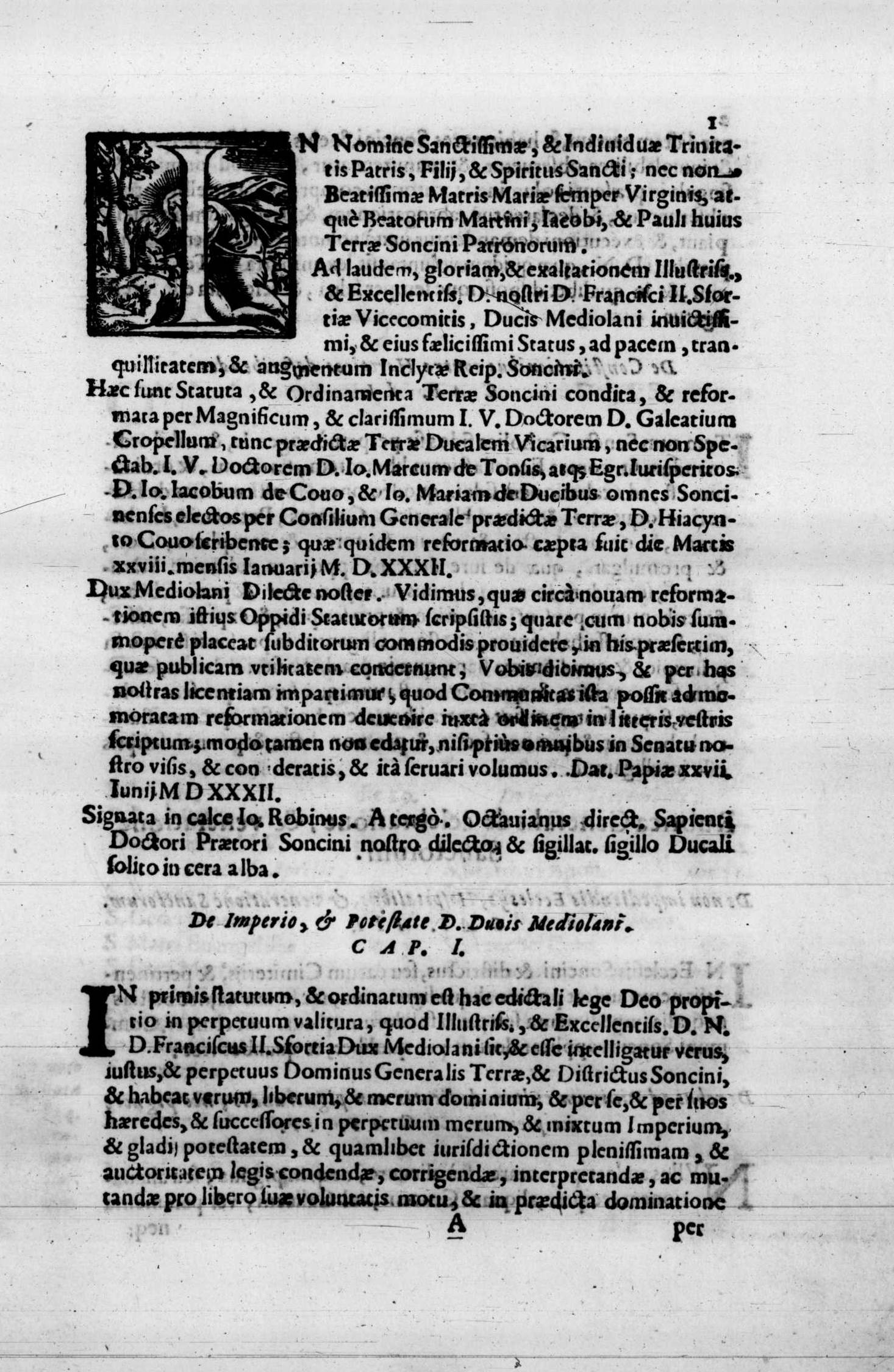 Frontespizio